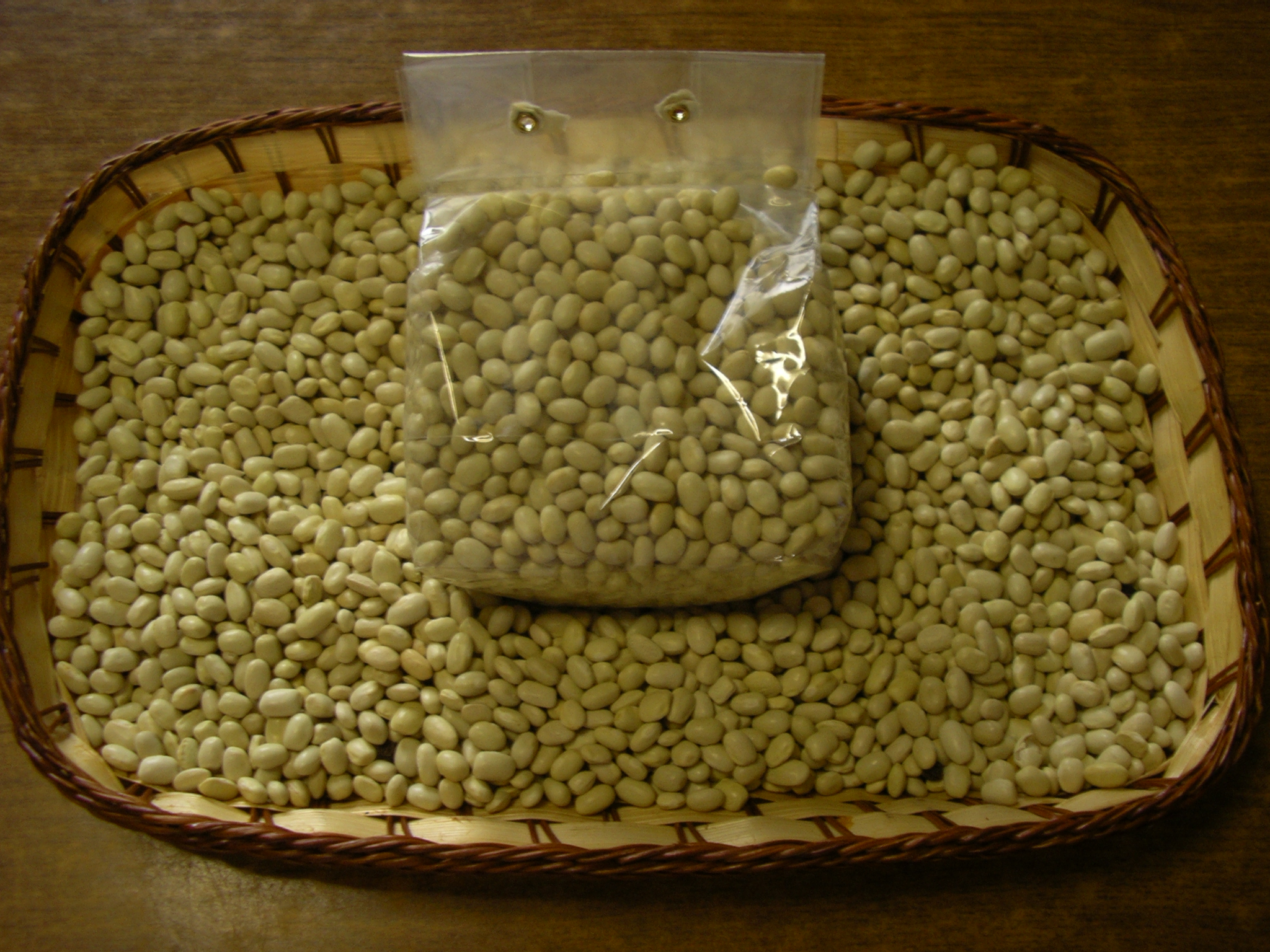 zolfini